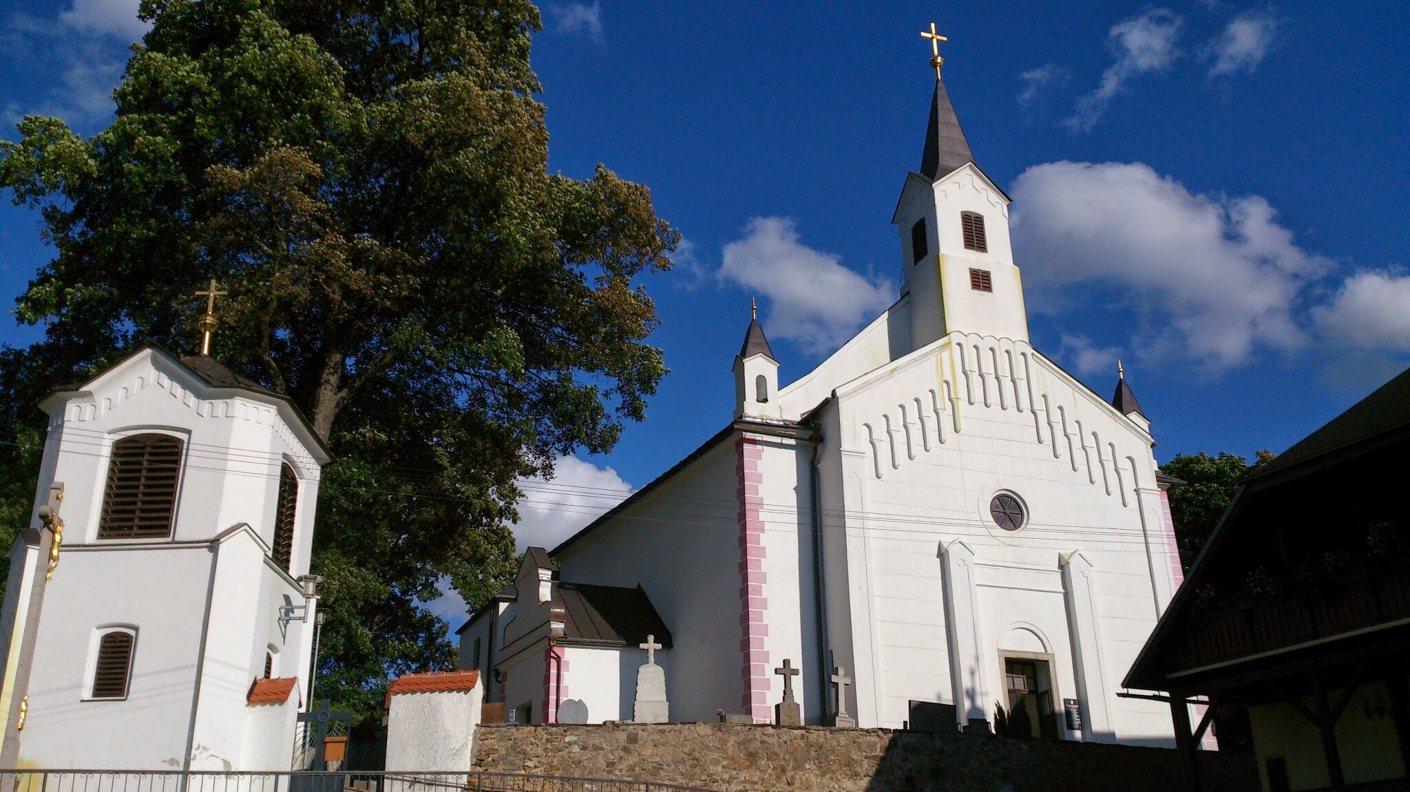 Kostel Nejsvětější trojice